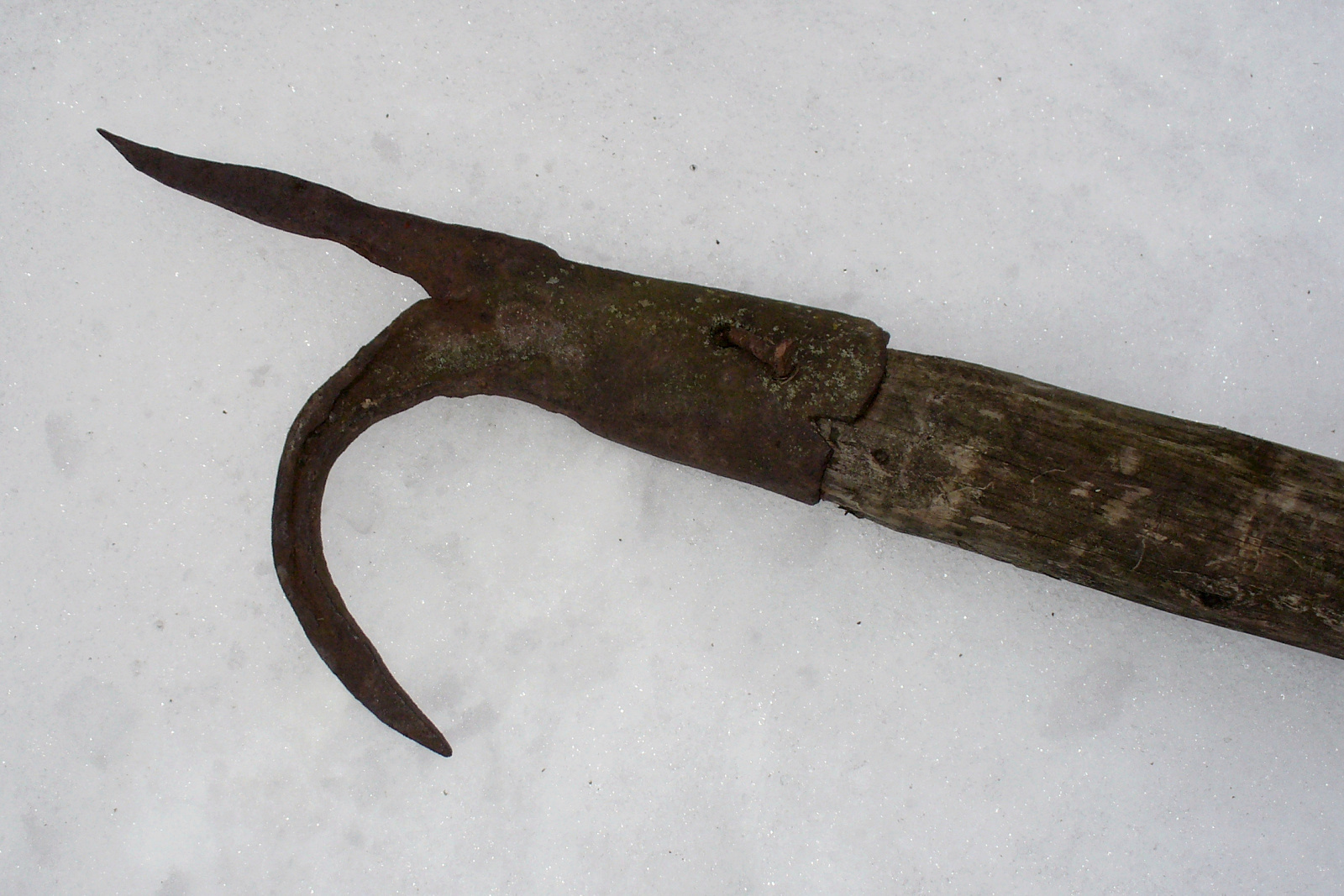 Старый багор на деревянной ручке.